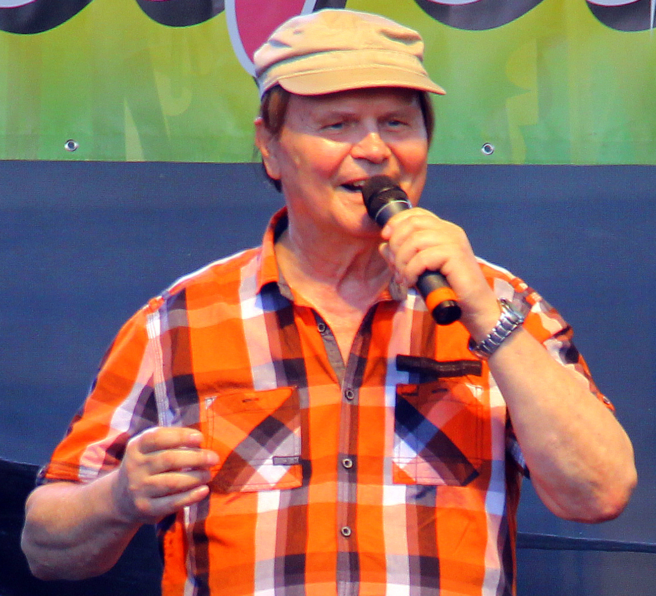 Slovenský spevák Dušan Grúň na májových oslavách v Nových Zámkoch (2018)